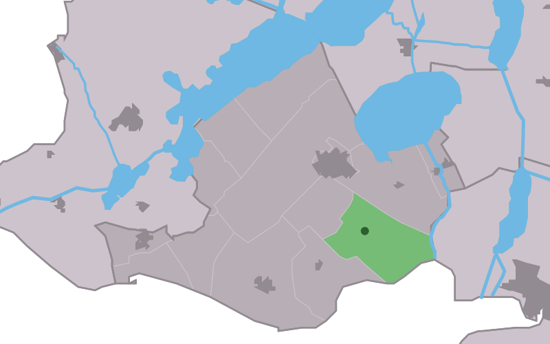 Kaartsje fan himrik fan Sondel